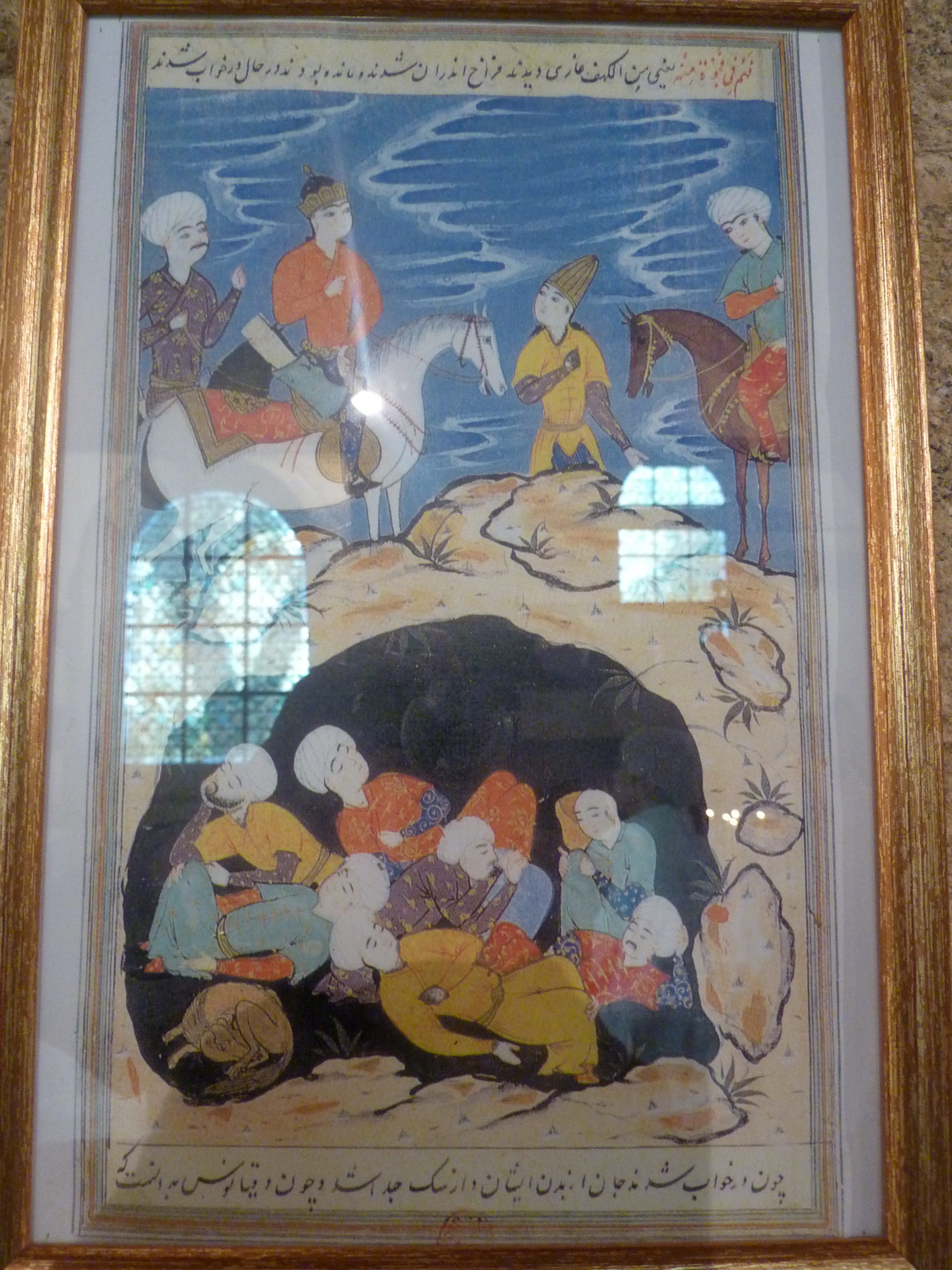 Le Vieux-Marché, chapelle des Sept-Saints : tableau offert par des Musulmans